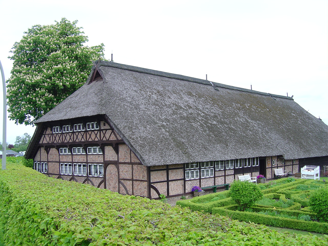 Das 1533 erbaute Rieckhaus in Curslack, Bezirk Bergedorf, Hamburg.